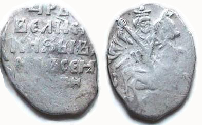 Kopek de Iván IV de Rusia